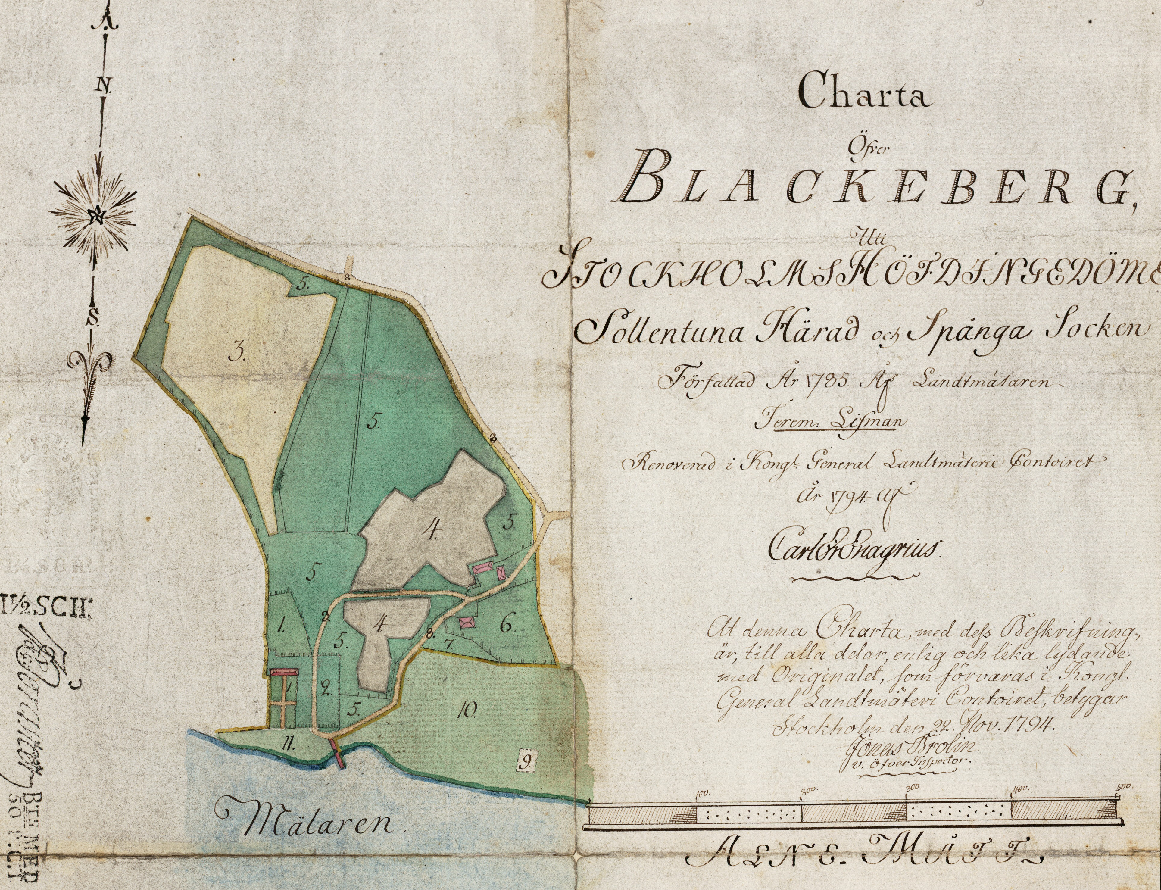 Charta öfver Blackeberg (1 och 2 är "Trädgårdarne" och "Mangården")